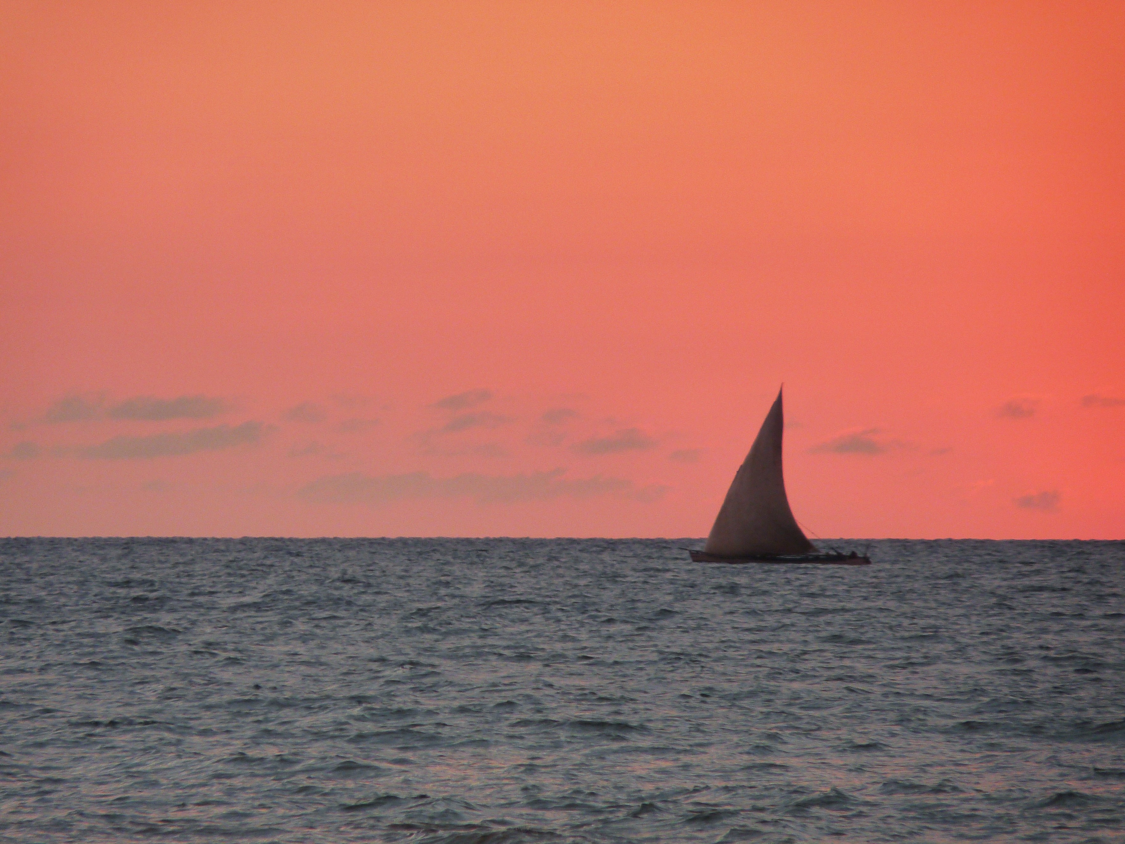 Pêcheurs sur le canal du Mozambique